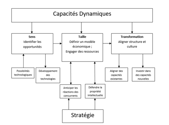 le concept de la notion des capacités dynamiques